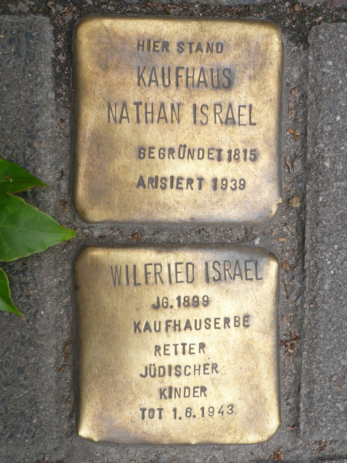 Erinnerung an das Kaufhaus Nathan Israel, gegr. 1815, arisiert 1939 sowie an den Nachfahren und letzten Inhaber Wilfrid Israel (* 1899, † 1943). „Stolpersteine“ des Künstlers Gunter Demnig am Nikolaiviertel Rathaus- / Ecke Spandauer Straße in Berlin-Mitte.